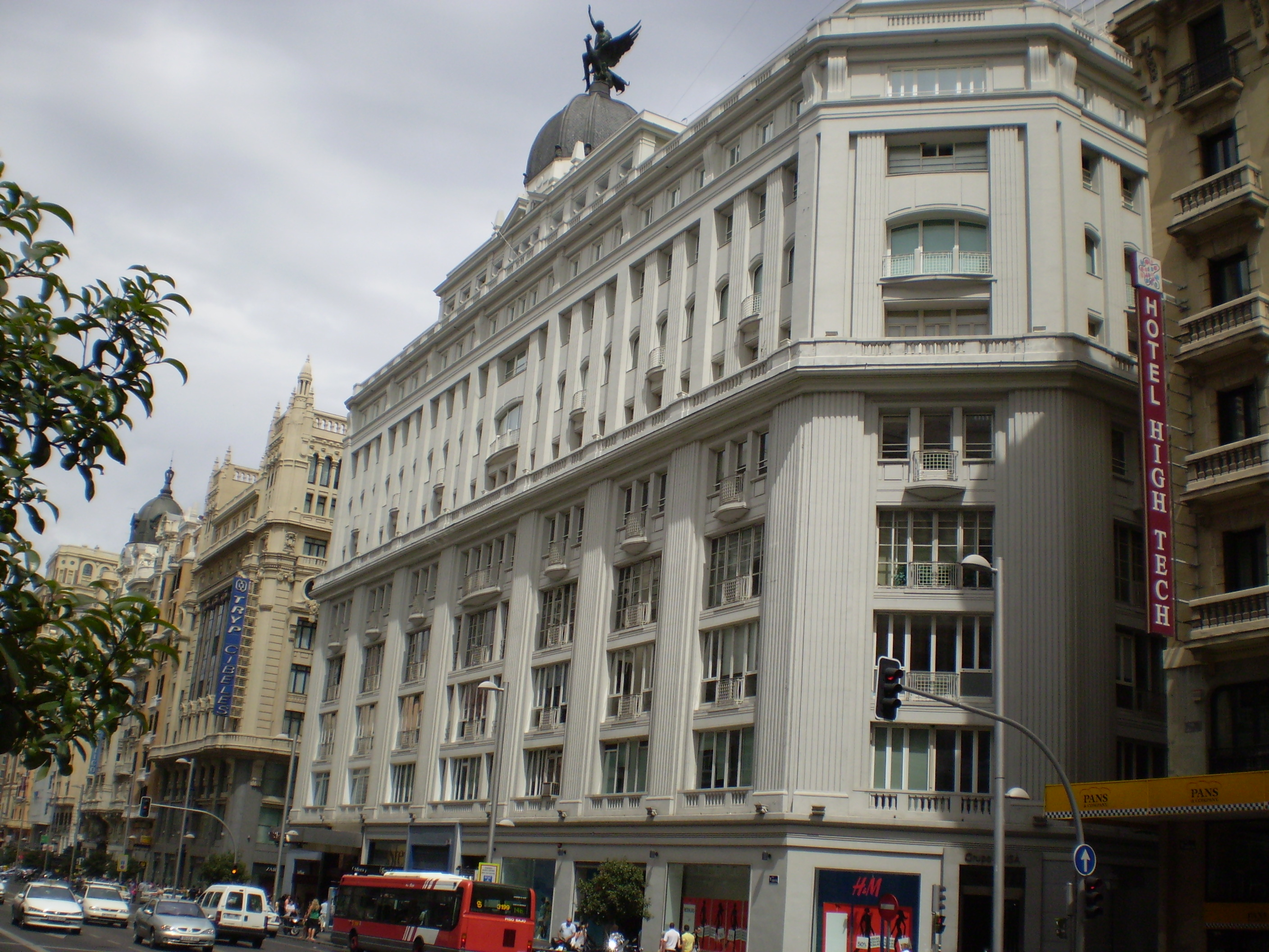 Edificio de PRISA. Madrid, Spain